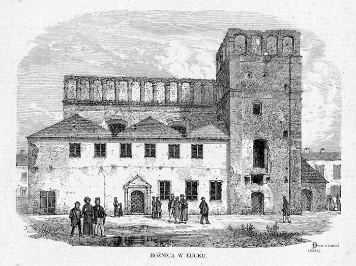 Велика синагога, Луцьк.